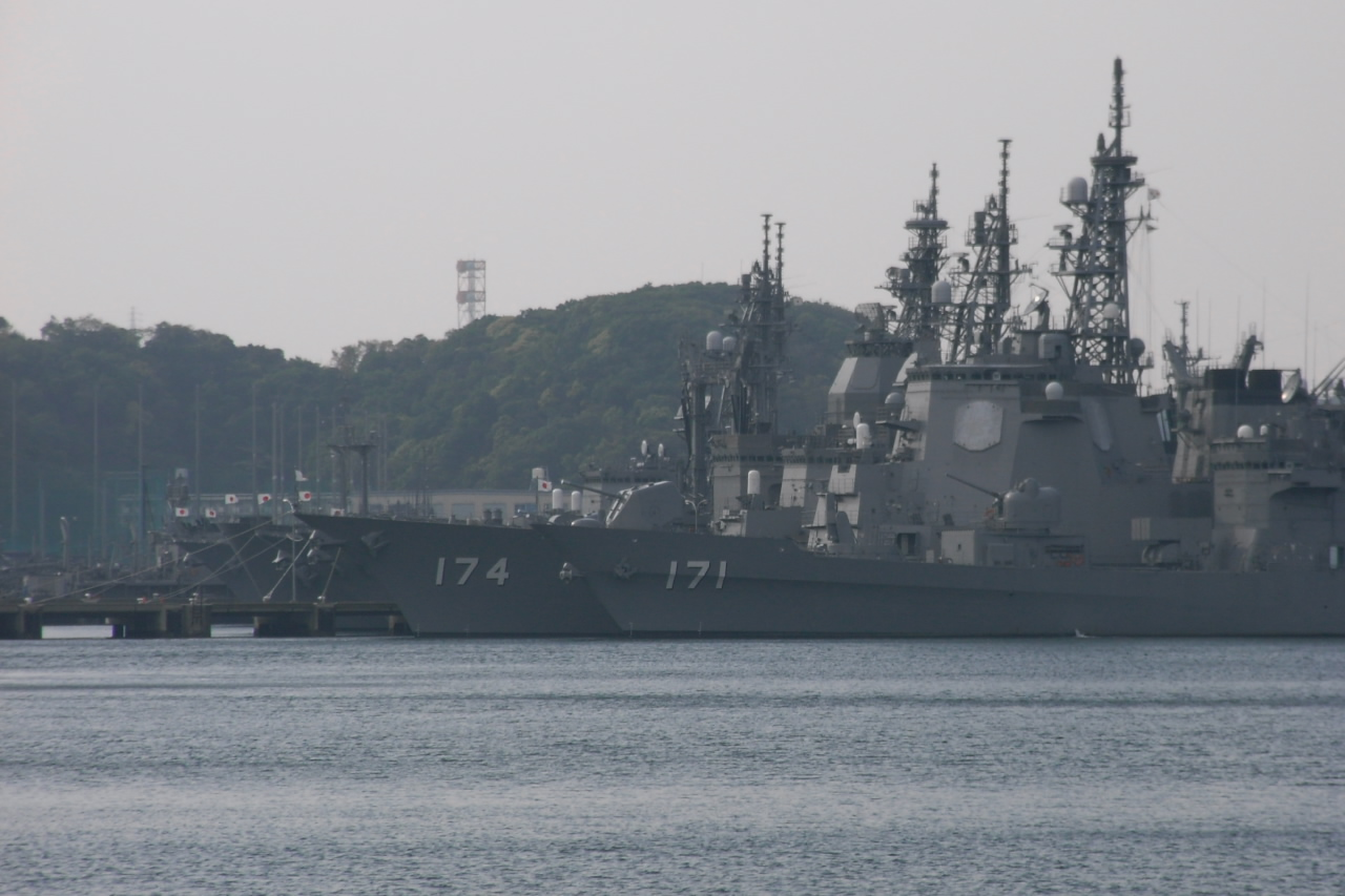 横須賀・吉倉桟橋に係留中の護衛艦はたかぜ 〔手前〕、きりしま 〔奥〕。ヴェルニー公園から望遠で撮影。